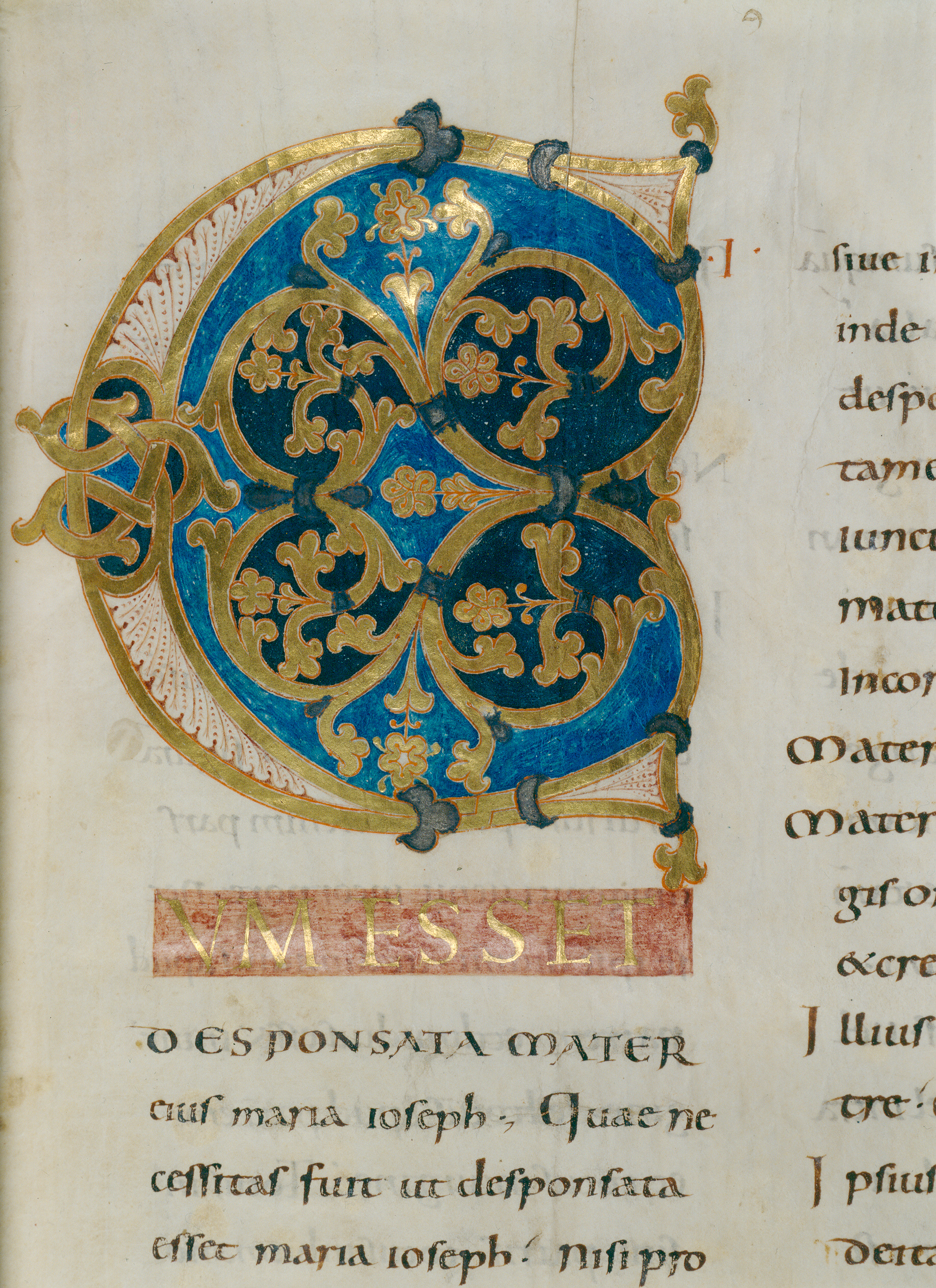 Lektionar, Reichenau, 2. Drittel des 10. Jahrhunderts Manuscript in the Badische Landesbibliothek, Karlsruhe, Germany Cod. Aug. perg. 16, Bl. 9r